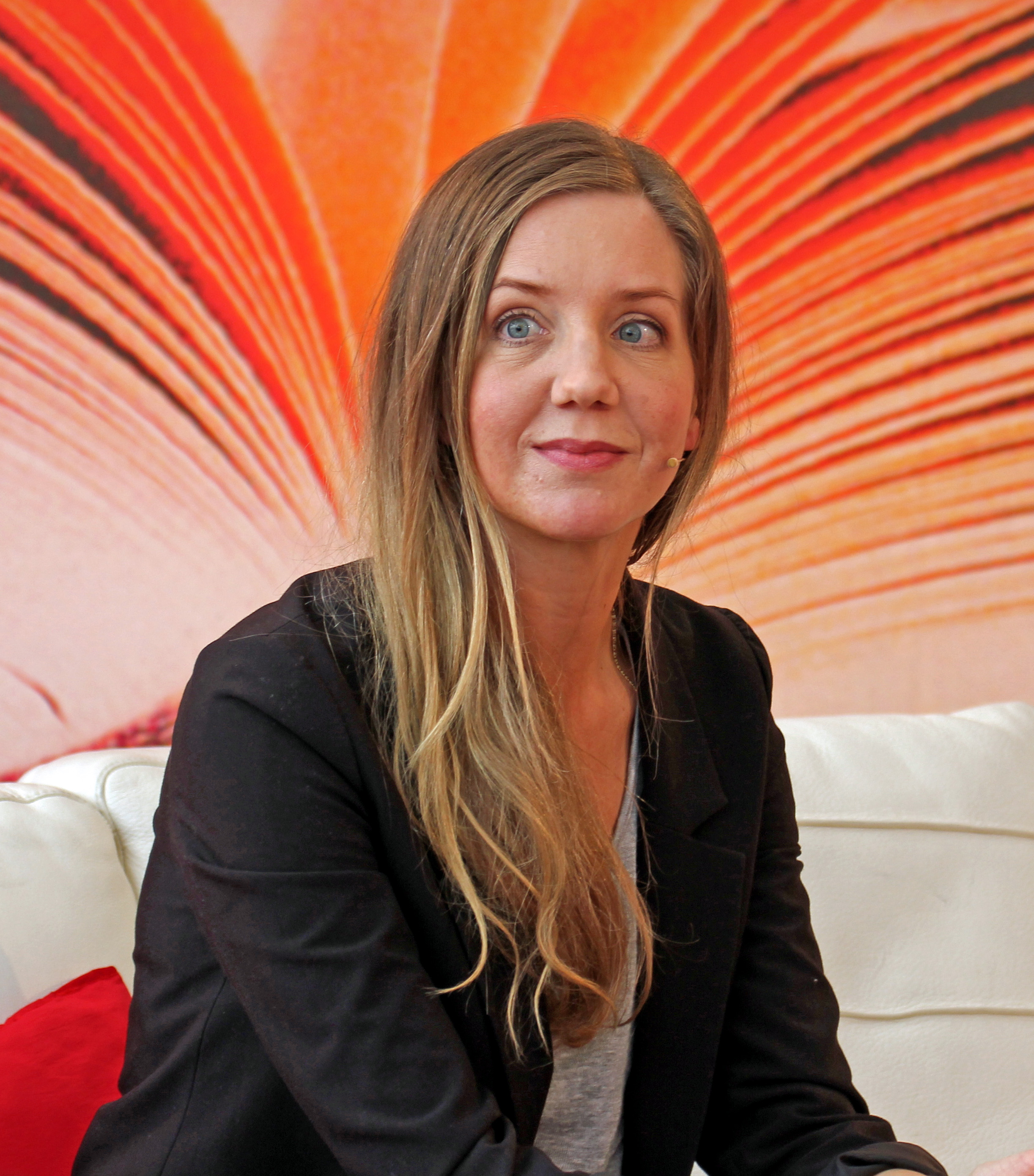 Svenja Leiber auf der Leipziger Buchmesse 2018.